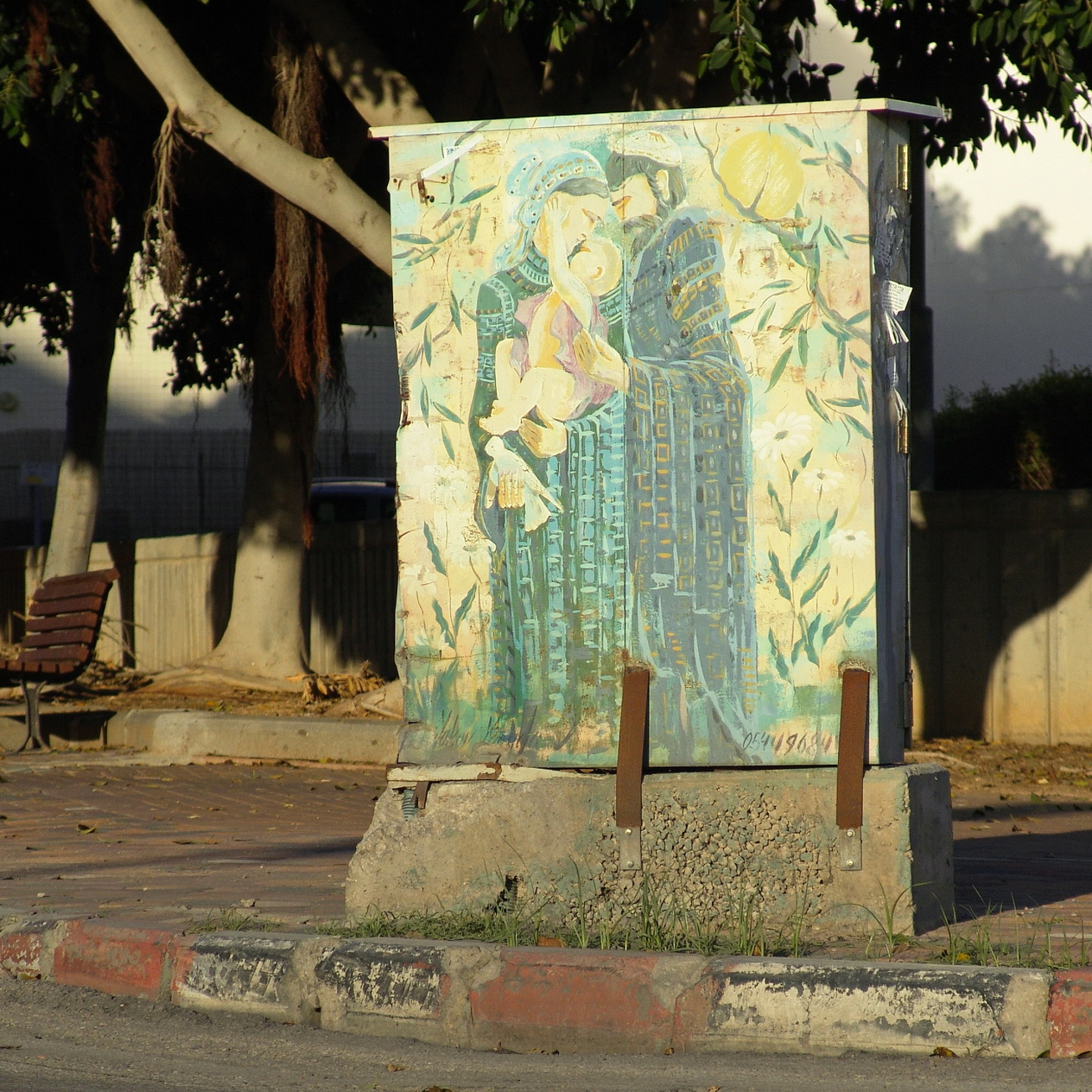 ציור על גבו של ארון סעף בשכונת נווה דקלים, אשקלון, ישראל.